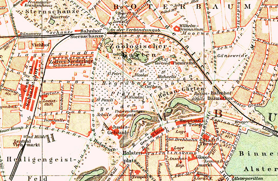 Begräbnisplatz der Hambburger Kirchen 1890, Ausschnitt aus Hamburg.Plan.1890.png